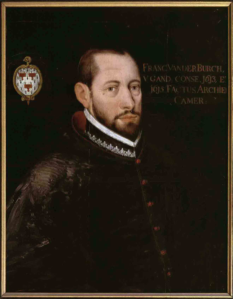 Sint-Baafskathedraal, Gent Portret van Mgr. Franc Vander Burch; inv nr: 499/5